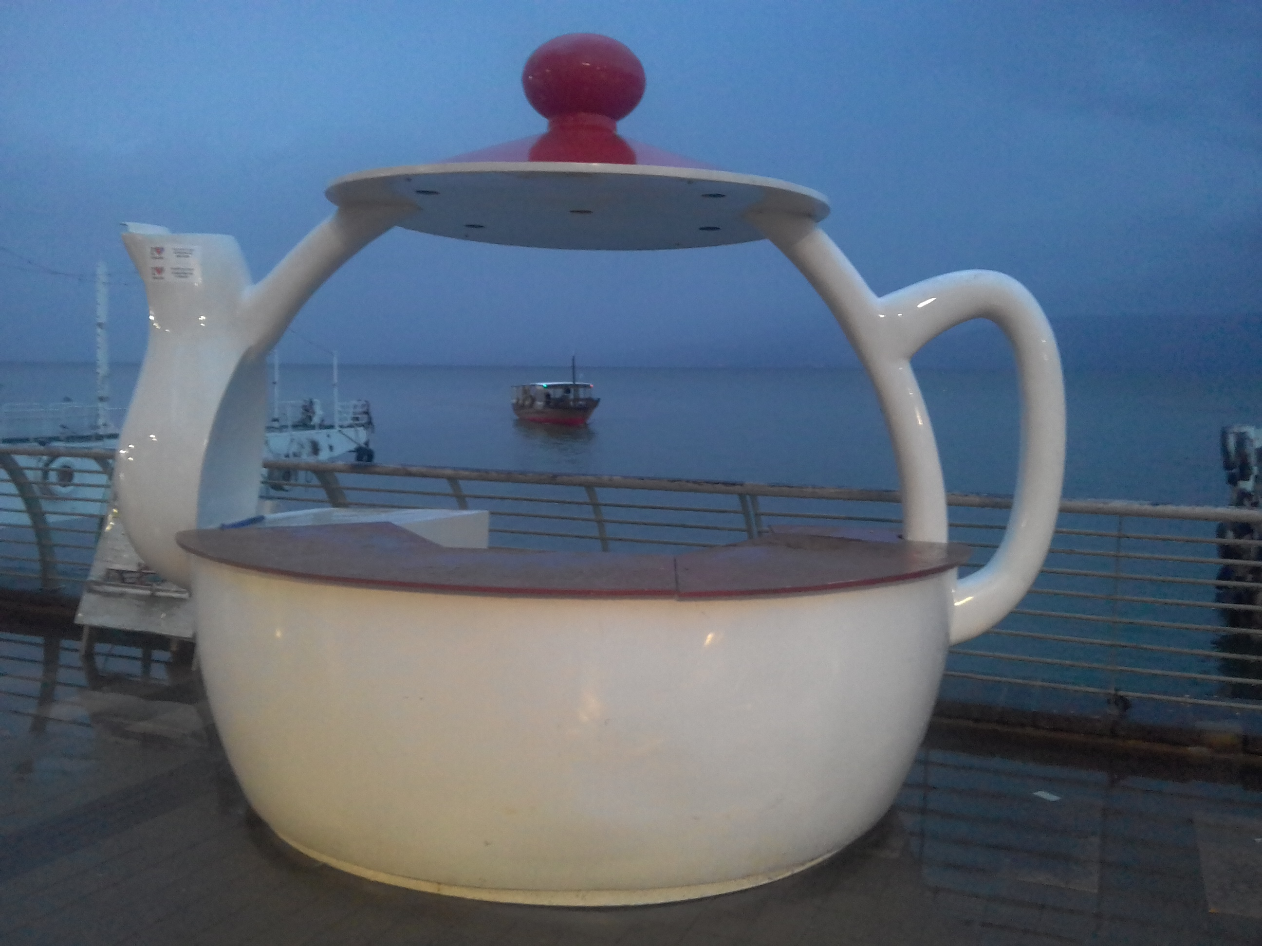 Tiberiya